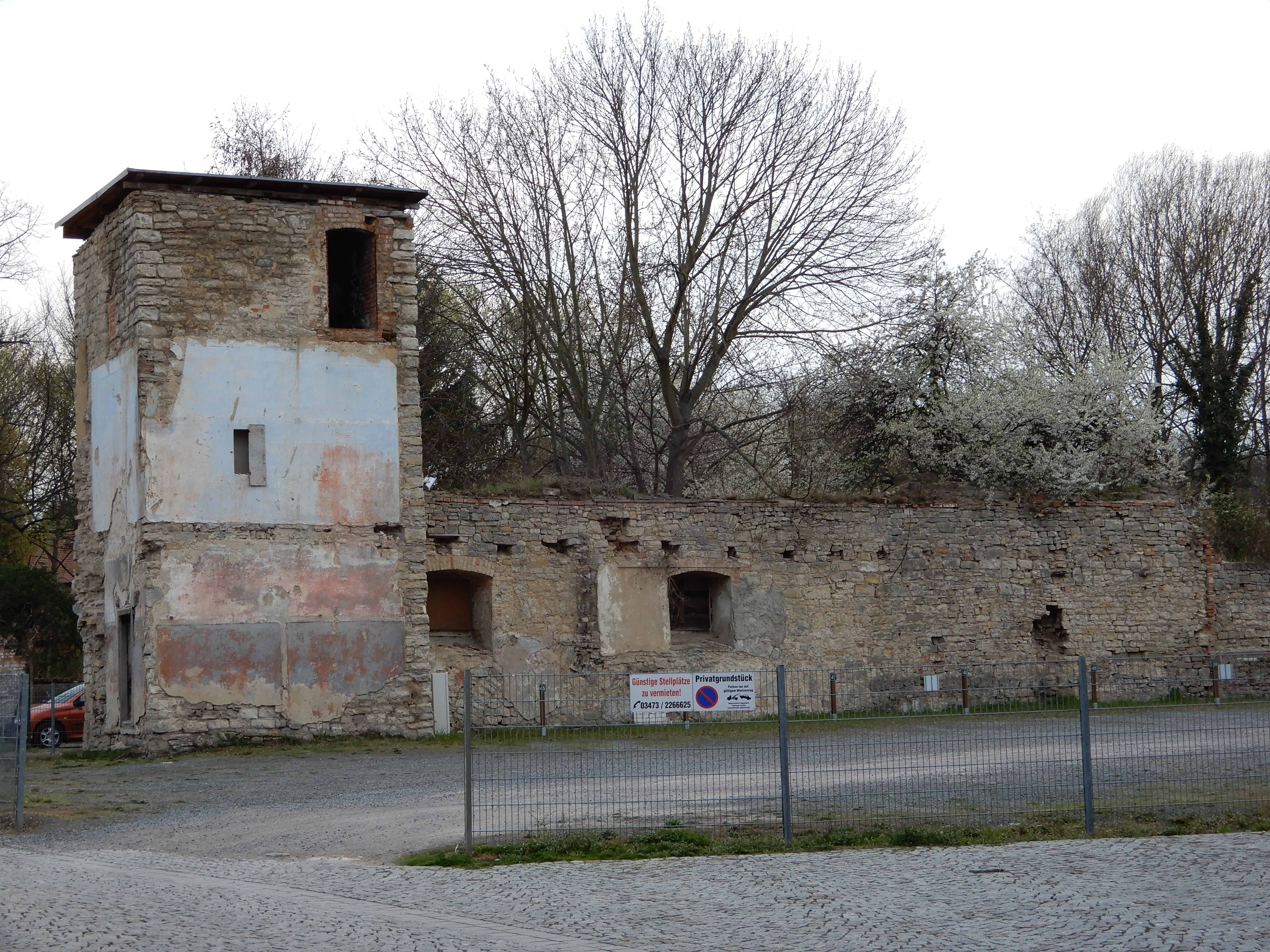 Turm der Stadtmauer am Grunndstück ehemals Badstuben 14 (Kunstschatulle)